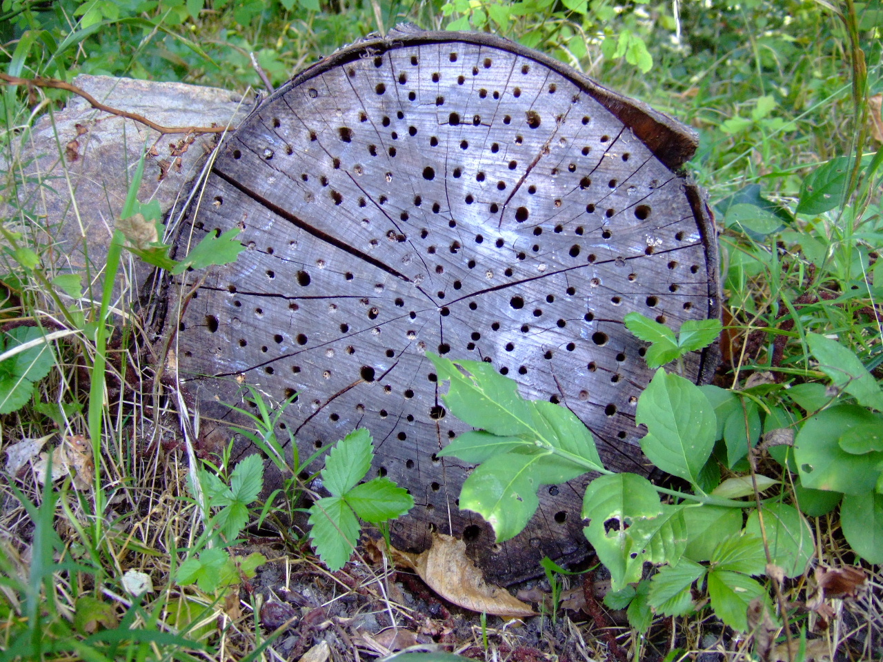 Arboretum Park Härle – Wildbienen-Hotel im Waldpark